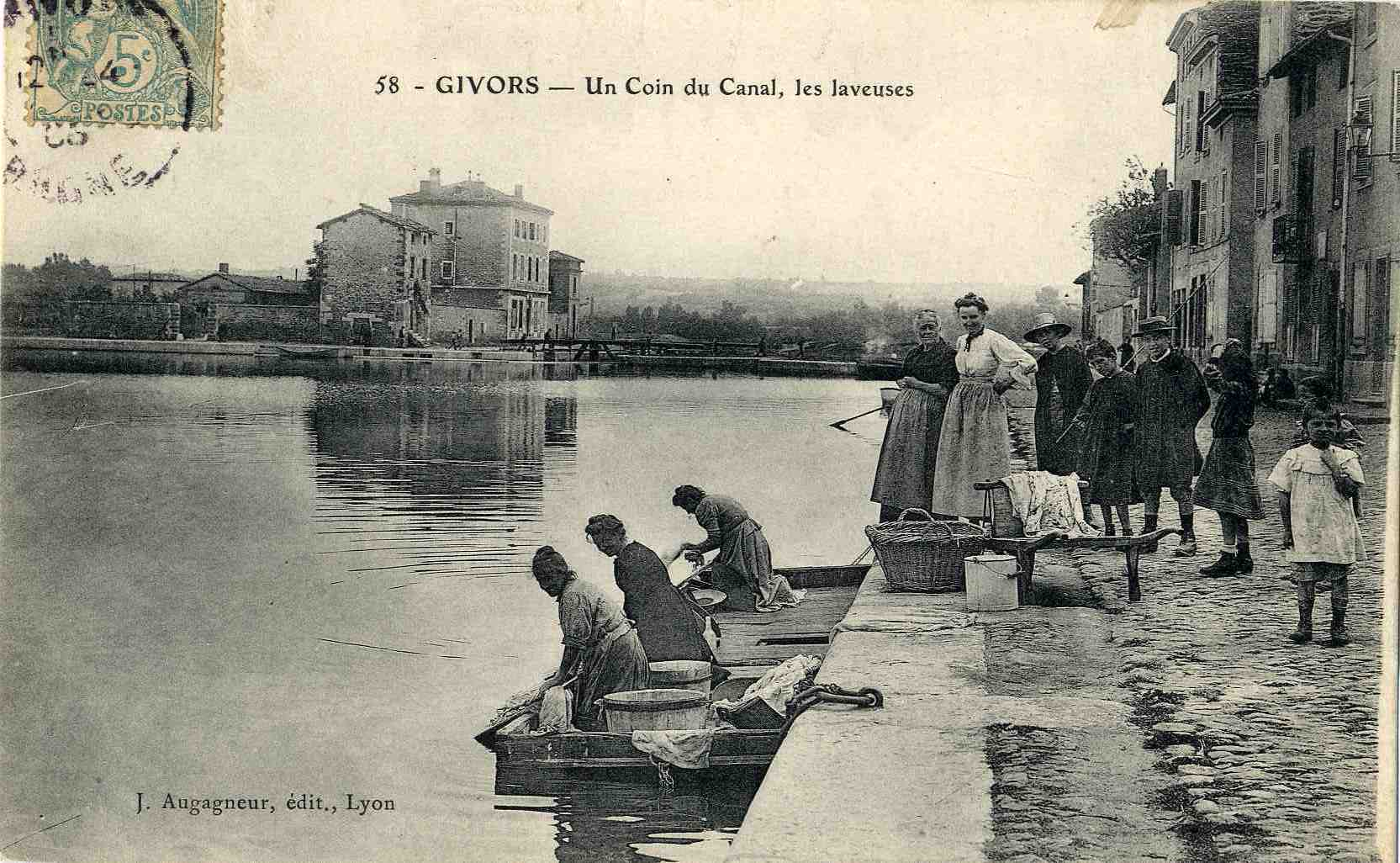 Le Bassin du Canal, entrée d'autoroute actuelle.